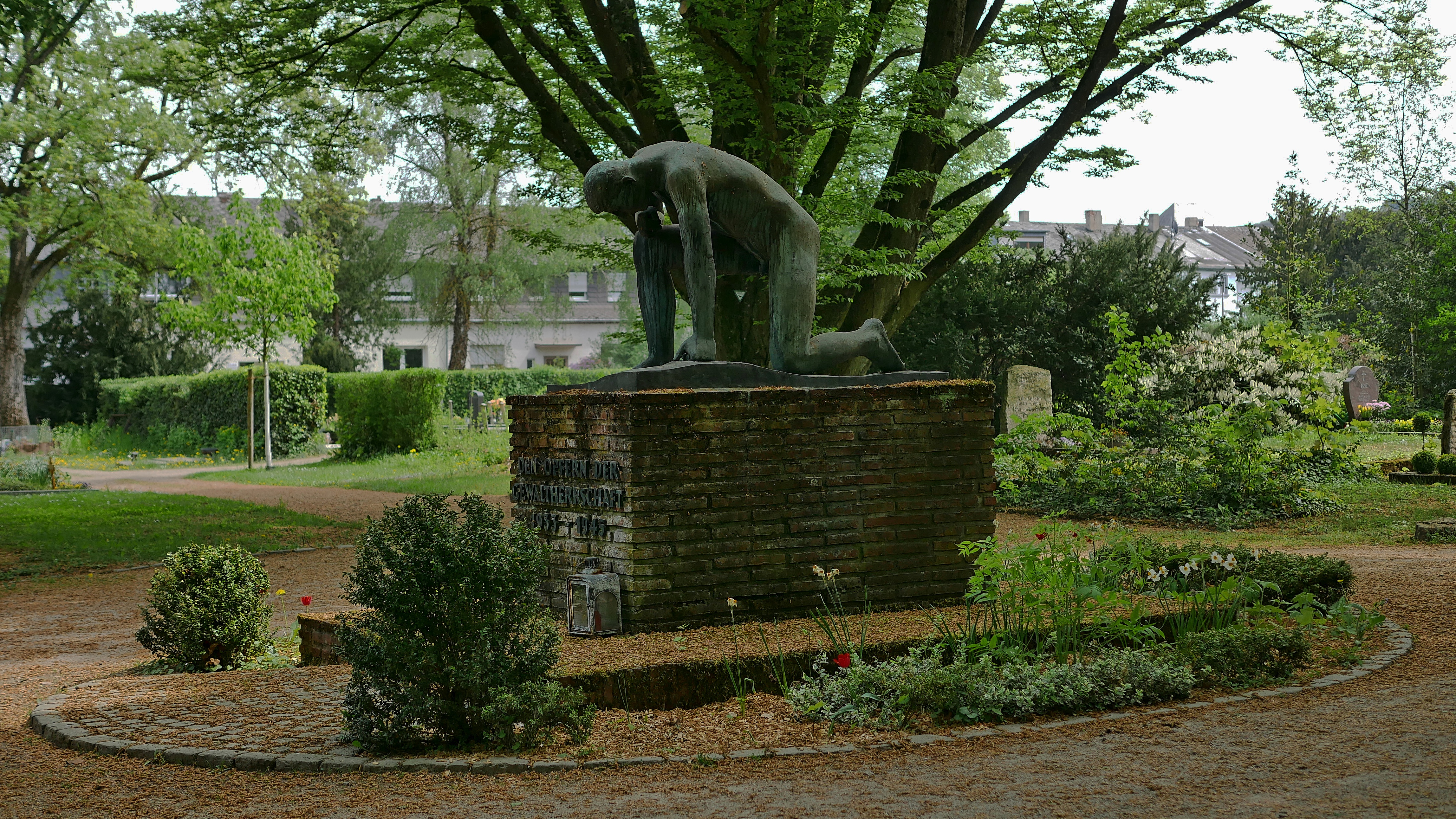 Denkmal für die Opfer der Gewaltherrschaft, 1950 geschaffen vom Trierer Bildhauer Michael Trierweiler. Hauptfriedhof Trier (in der Nähe des jüdischen Friedhofs und der neuen Aussegnungshalle)